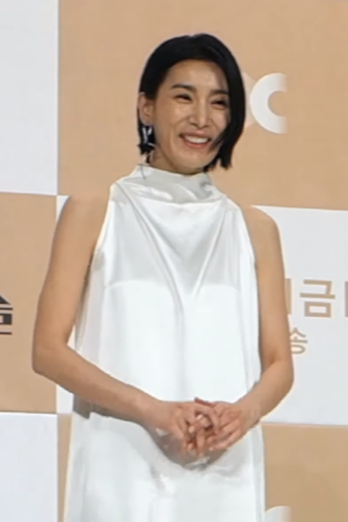 181122 JTBC 'SKY캐슬' 제작발표회